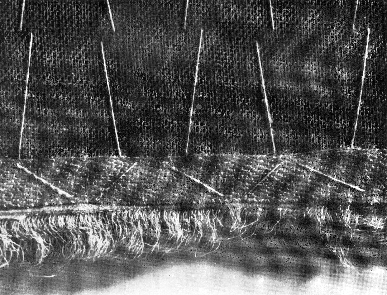 Nähte in der Kürschnerei: Absatz „Pikieren“.